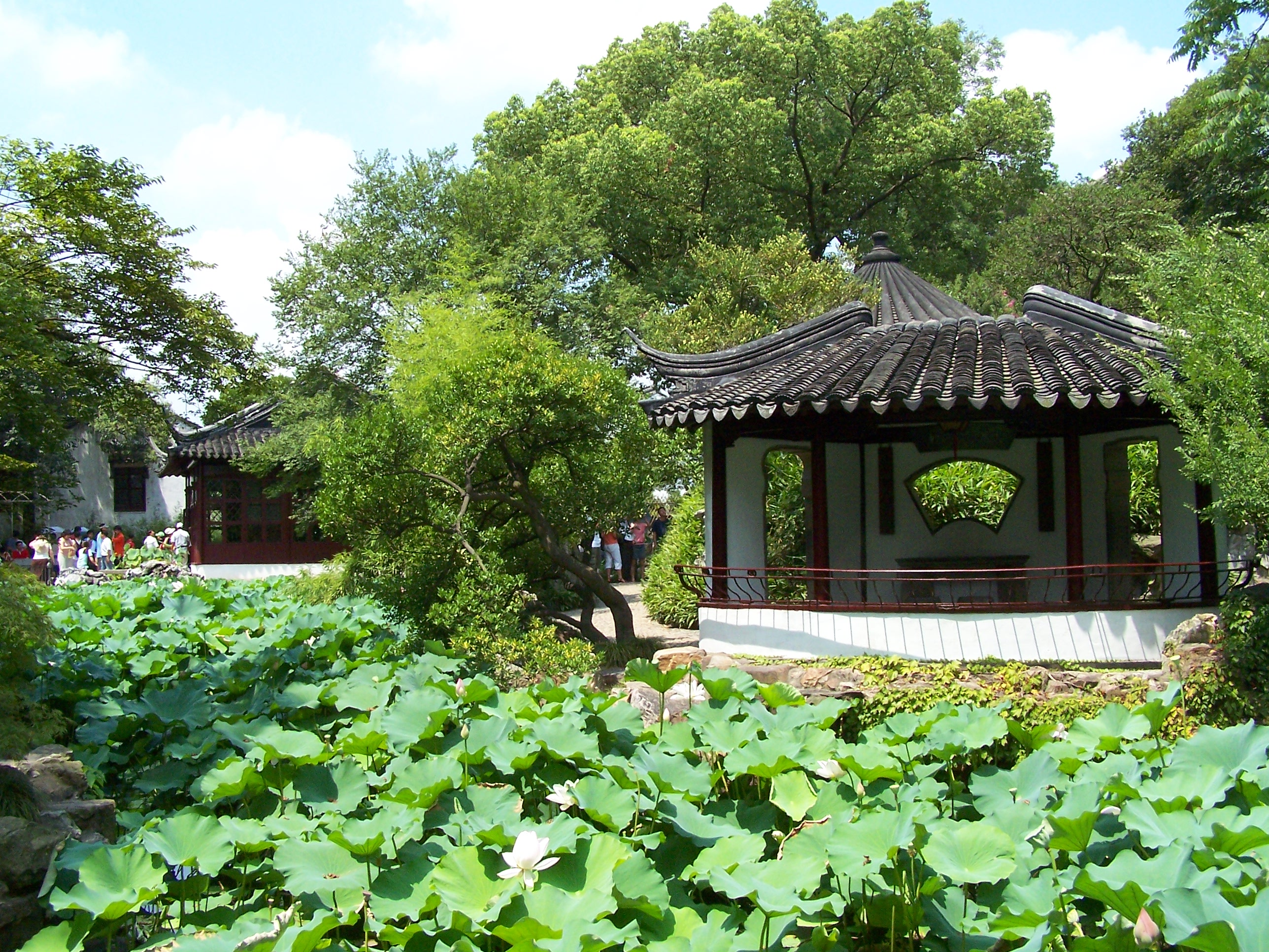 Pavillon "on s'assoie avec qui?"